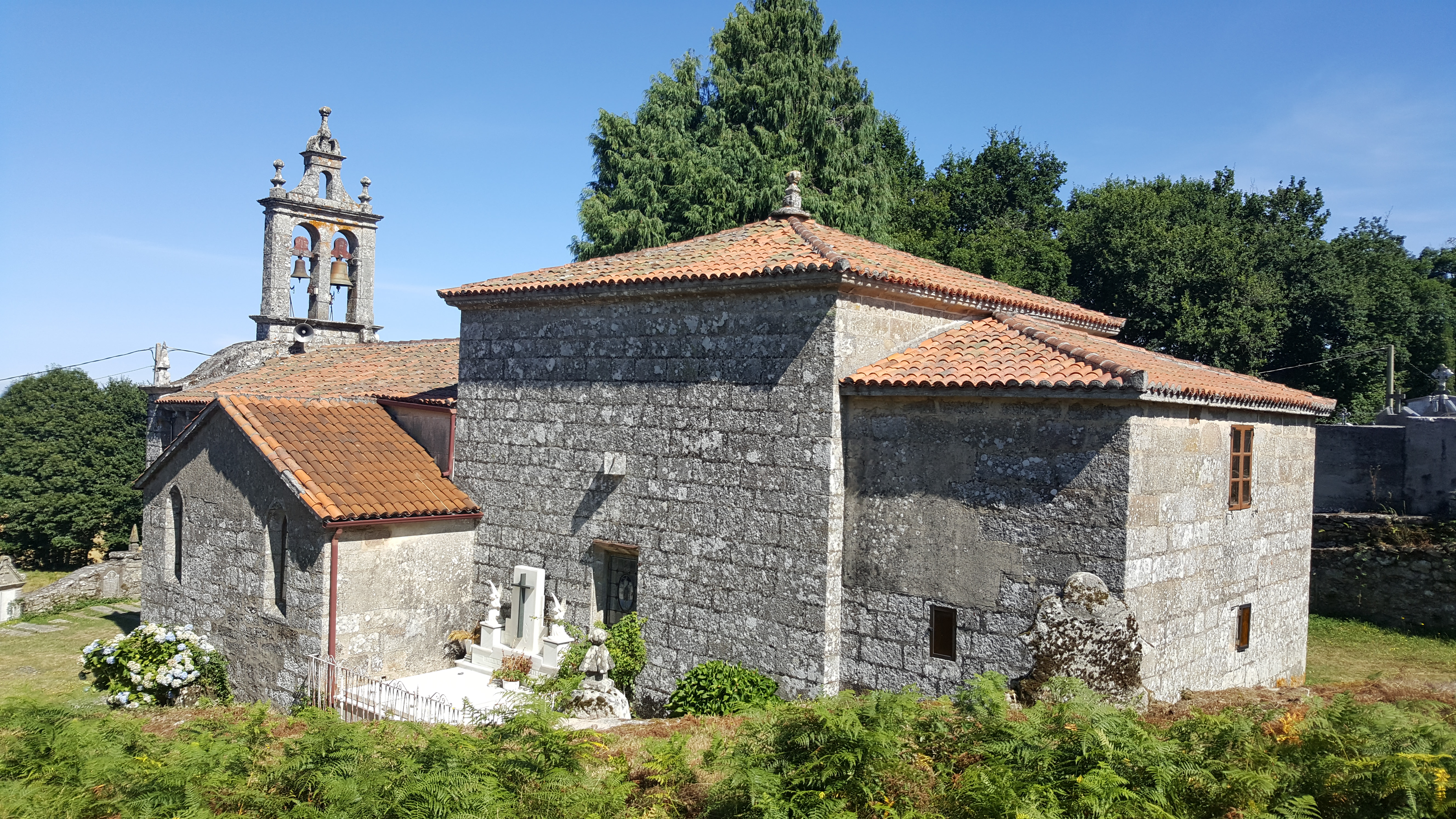 Igrexa parroquial de Borraxeiros (Agolada)